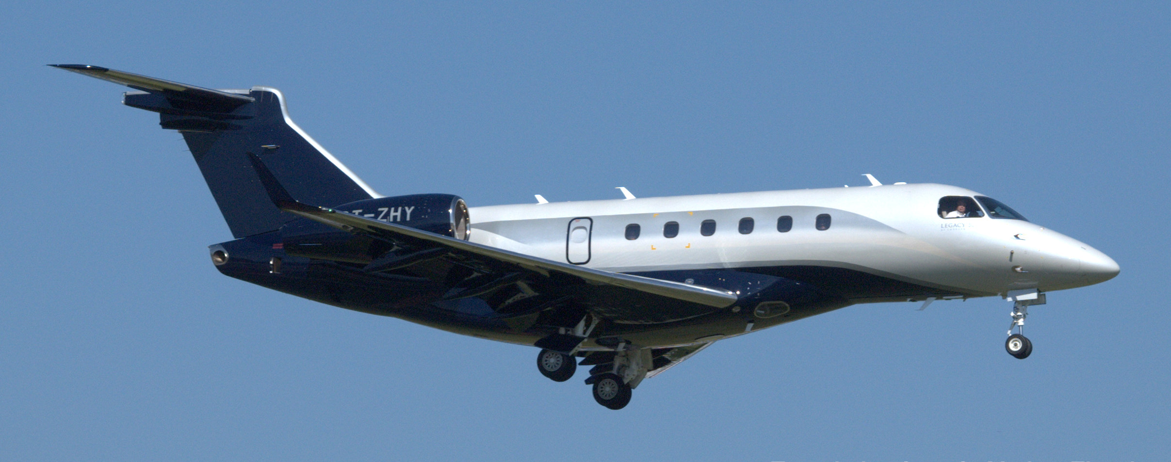 GVA 18.05.14